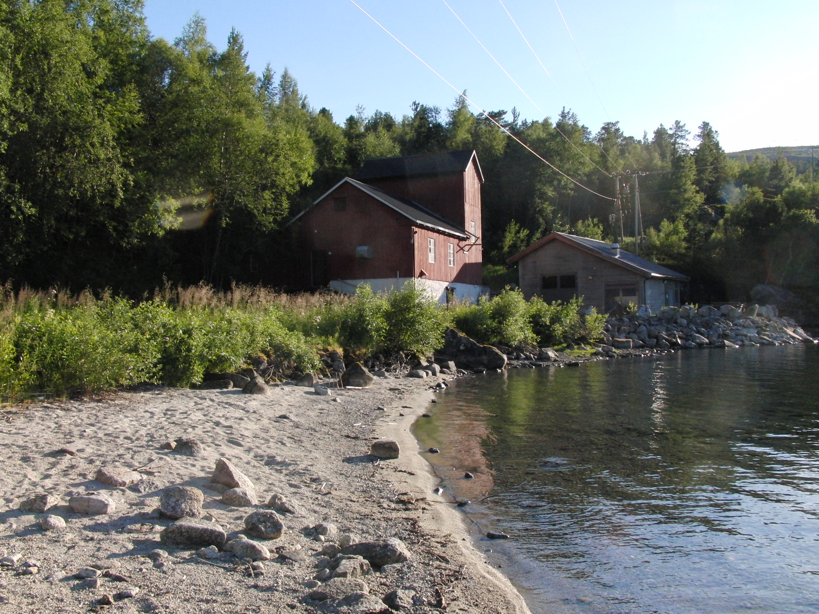 Røyrvatn kraftverk, gammelt og nytt